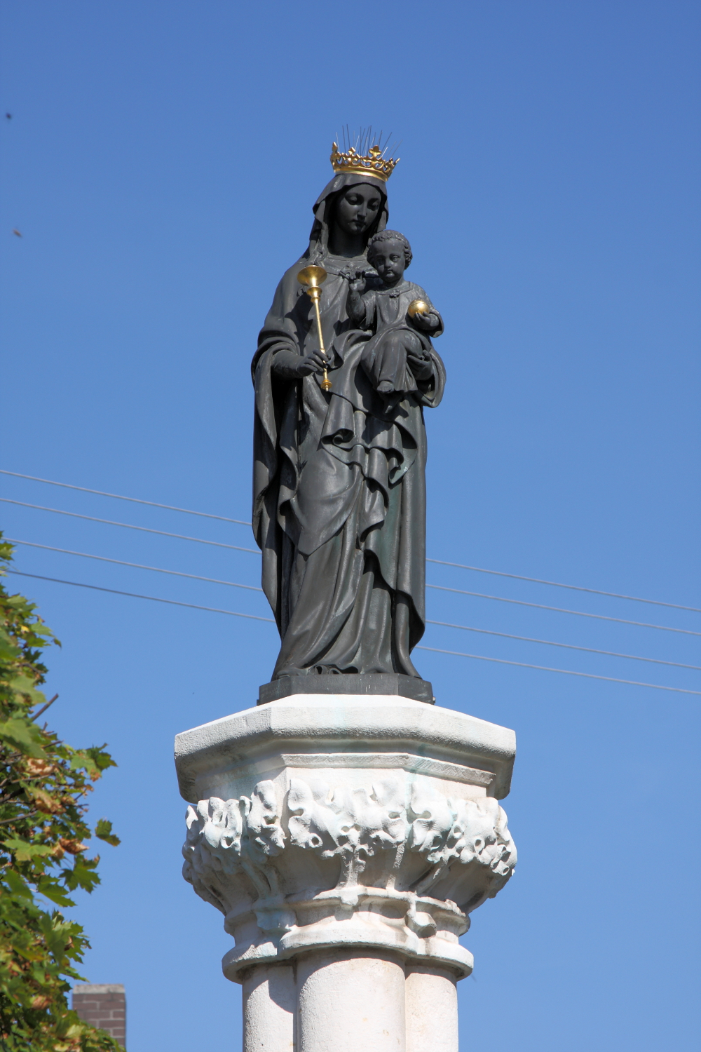 nach Mitte 19. JahrhundertThis is a photograph of an architectural monument.